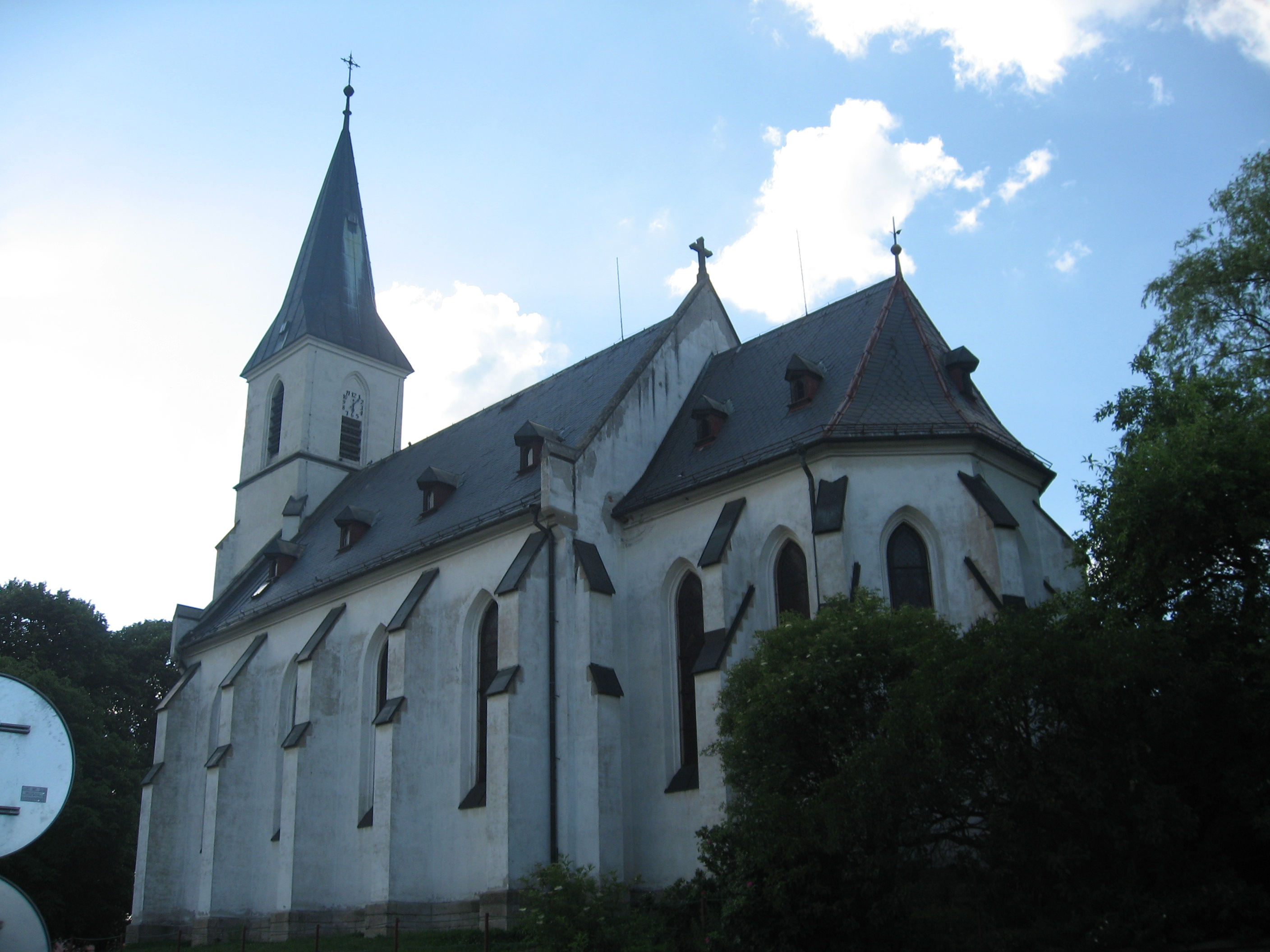 Ždírec, okres Jihlava - kostel sv. Václava